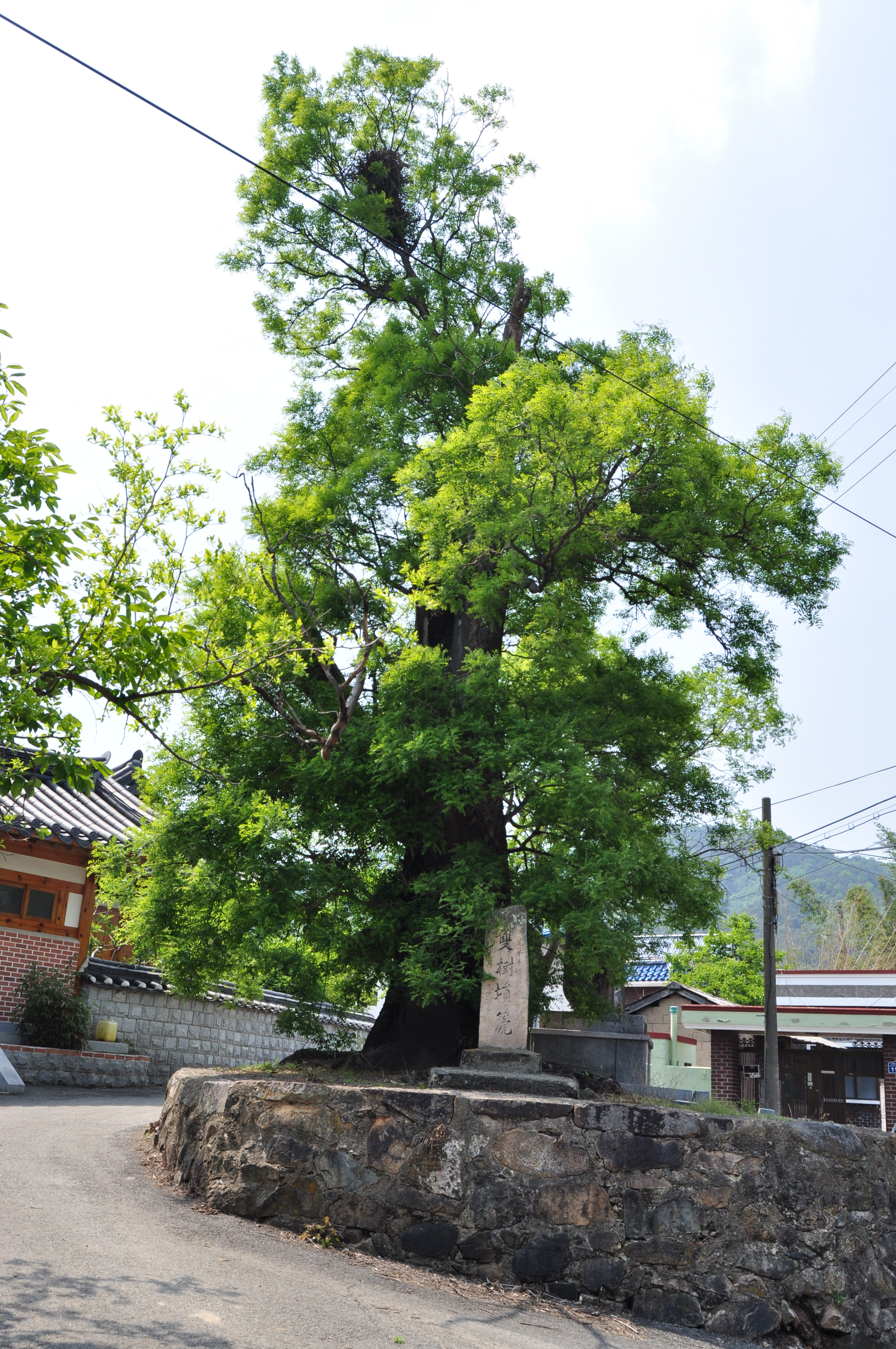 김해시 진례면 시례리 진례로 311번길 107 앞에 위치한 느티나무. 수령 300년 이상.